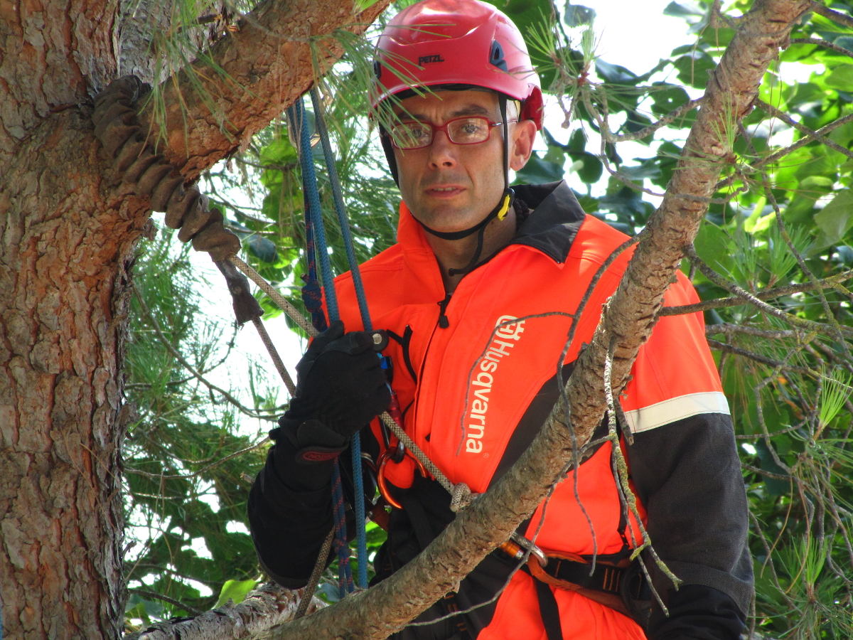 tree climber